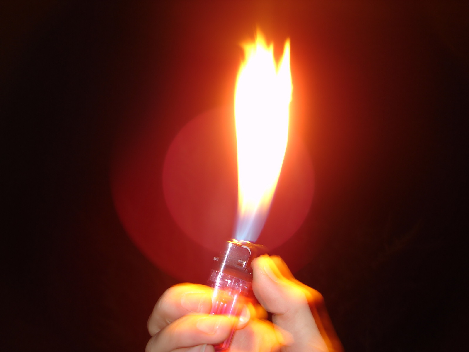 Aufgenommen von ec-hasslau.de